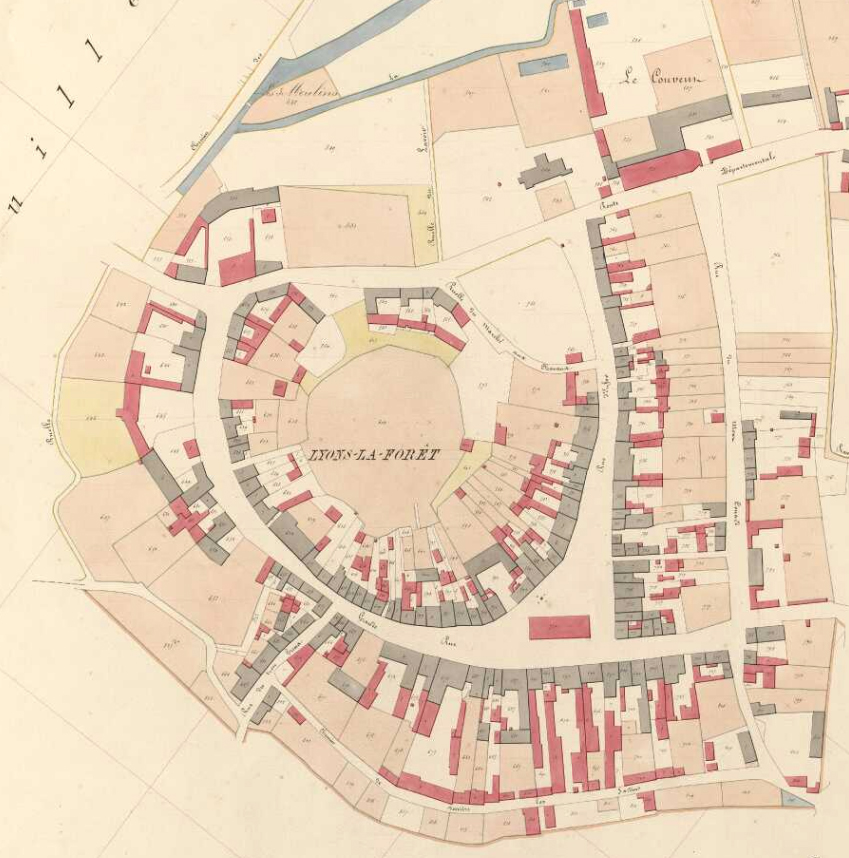 Extrait du cadastre napoléonien réalisé en 1848 montrant le centre bourg de Lyons-la-Forêt et la présence dans le réseau viaire du château aujourd'hui disparu.